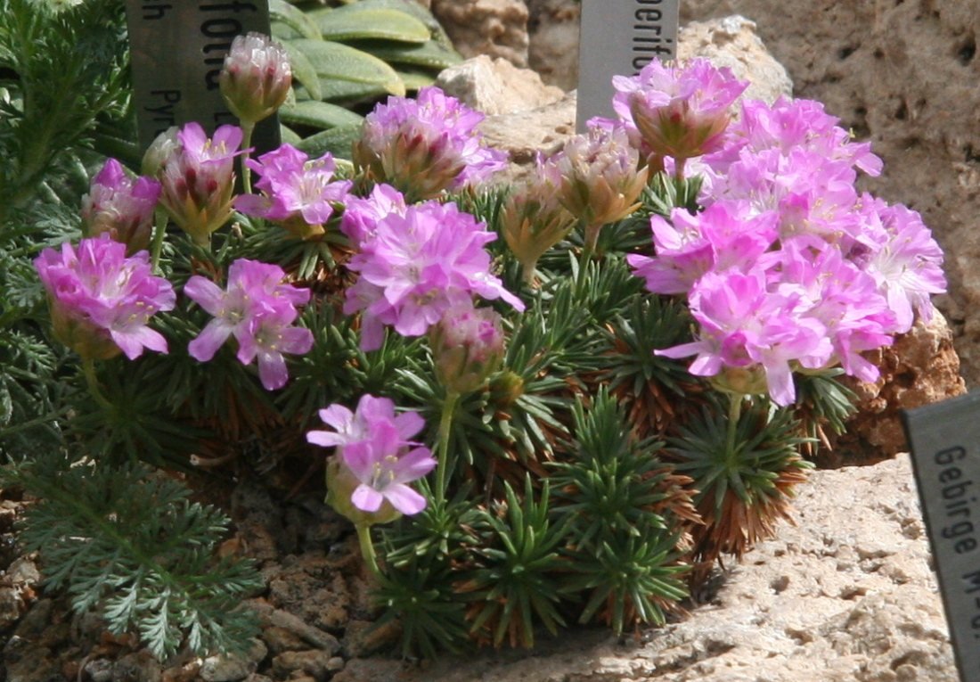 Armeria juniperifolia im Botanischen Garten Erlangen